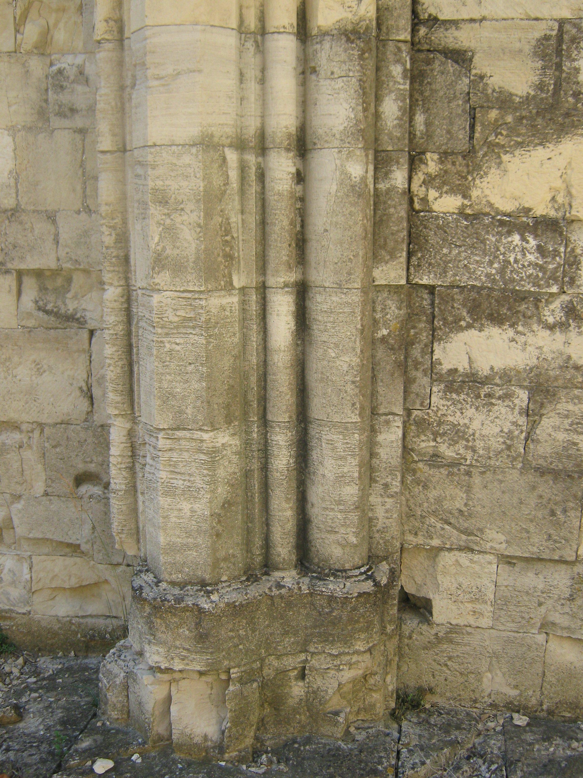 pilier de la nef, détail des moulures